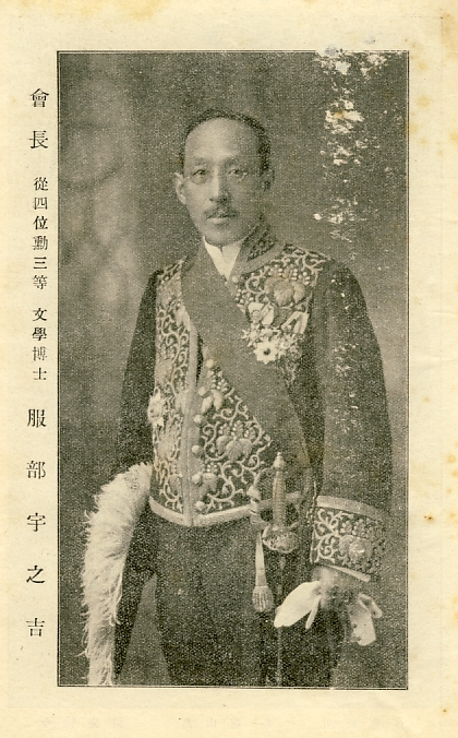 中文（台灣）: 服部宇之吉